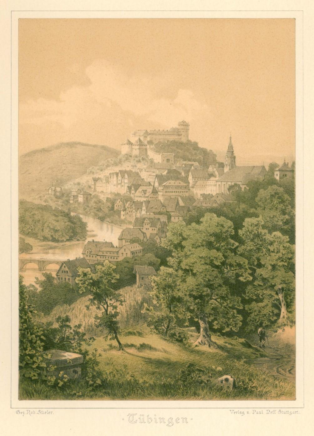 Blick auf Tübingen vom südlichen Österberg (aus „Reise durch Schwaben“; Farblithographie 25 x 18 cm; Schefold 9382a)